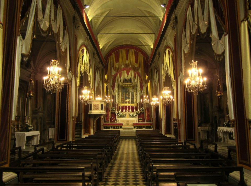 Pieve Fosciana, l'interno della Pieve di San Giovanni Battista addobbata dalle Palme alla seconda domenica di Pasqua.